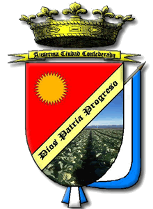 Escudo de la ciudad de Ansermanuevo (Valle del Cauca, Colombia): Corona Real: Se ciñe en su frente, ubicada en la parte superior, esta corona, la cual es de color dorado, representa el sometimiento y obediencia al REY DE ESPAÑA, como suprema autoridad sobre estas tierras. Cinta Emblemática: Una cinta Amarilla, con el nombre ANSERMA CIUDAD CONFEDERADA, este texto se debe a que Ansermanuevo hace parte de las ciudades confederadas entre las cuales se encuentran Caloto, Toro, Cartago, Buga y Cali. Cinta Divisoria: Cinta amarilla y en sentido diagonal adornada con letras góticas en negro las cuales dicen DIOS-PATRIA-PROGRESO. Campo Sembrado: Representa tierra fértil, cultivos, colinas y valles demostrando la variedad de climas y cultivos. El Sol: Sol dorado y radiante (Sin ocaso) representativo de la corona española. La Bandera del municipio: adorna el escudo.